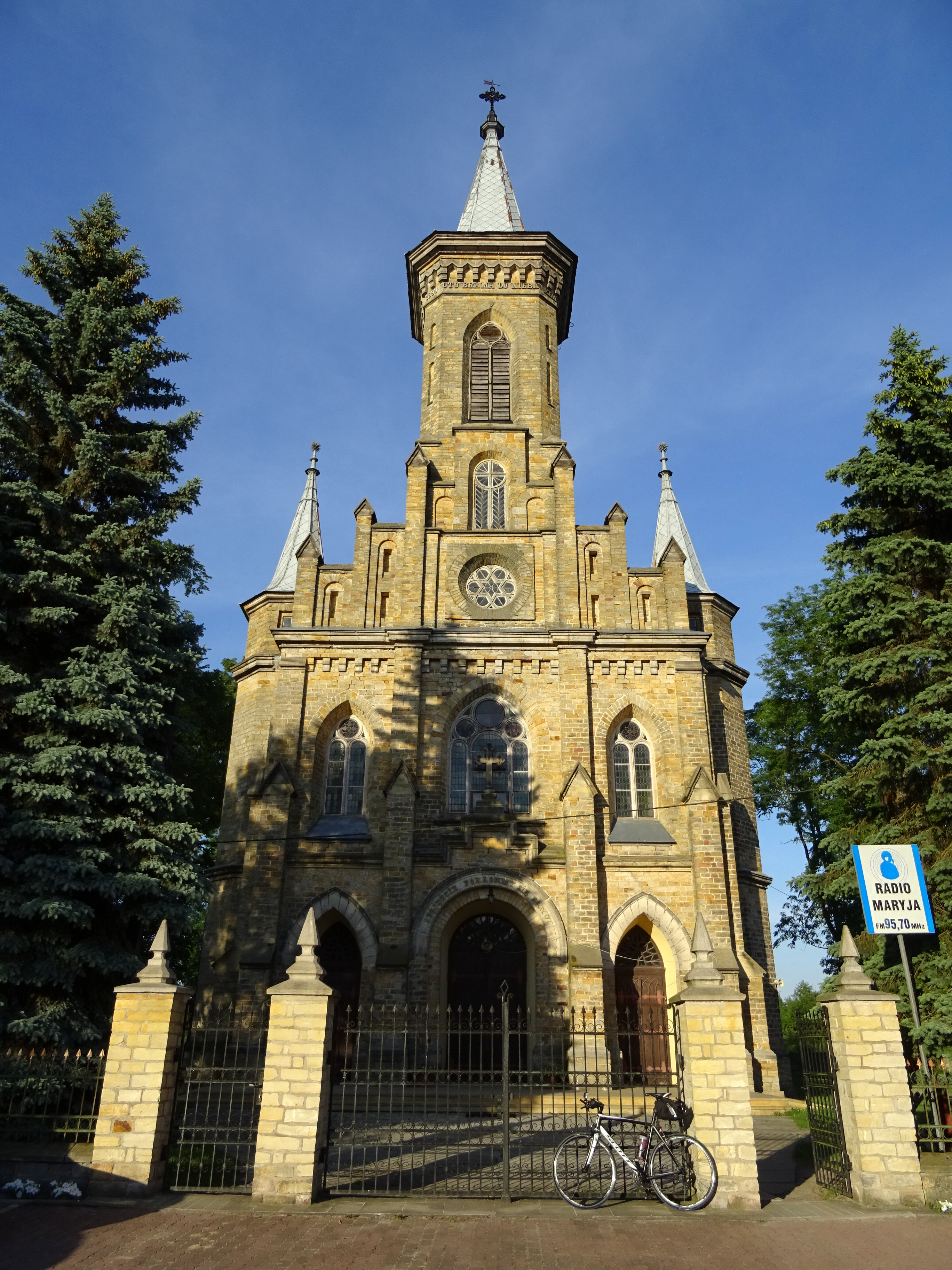 Dąbrowa nad Czarną - kościół św. św. Apostołów Piotra i Pawła